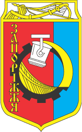 Герб Запорожья при СССР